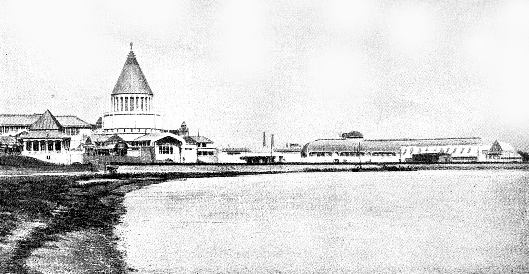 Landsudstillingen i Aarhus 1909 hvis hovedarkitekt var Anton Rosen.